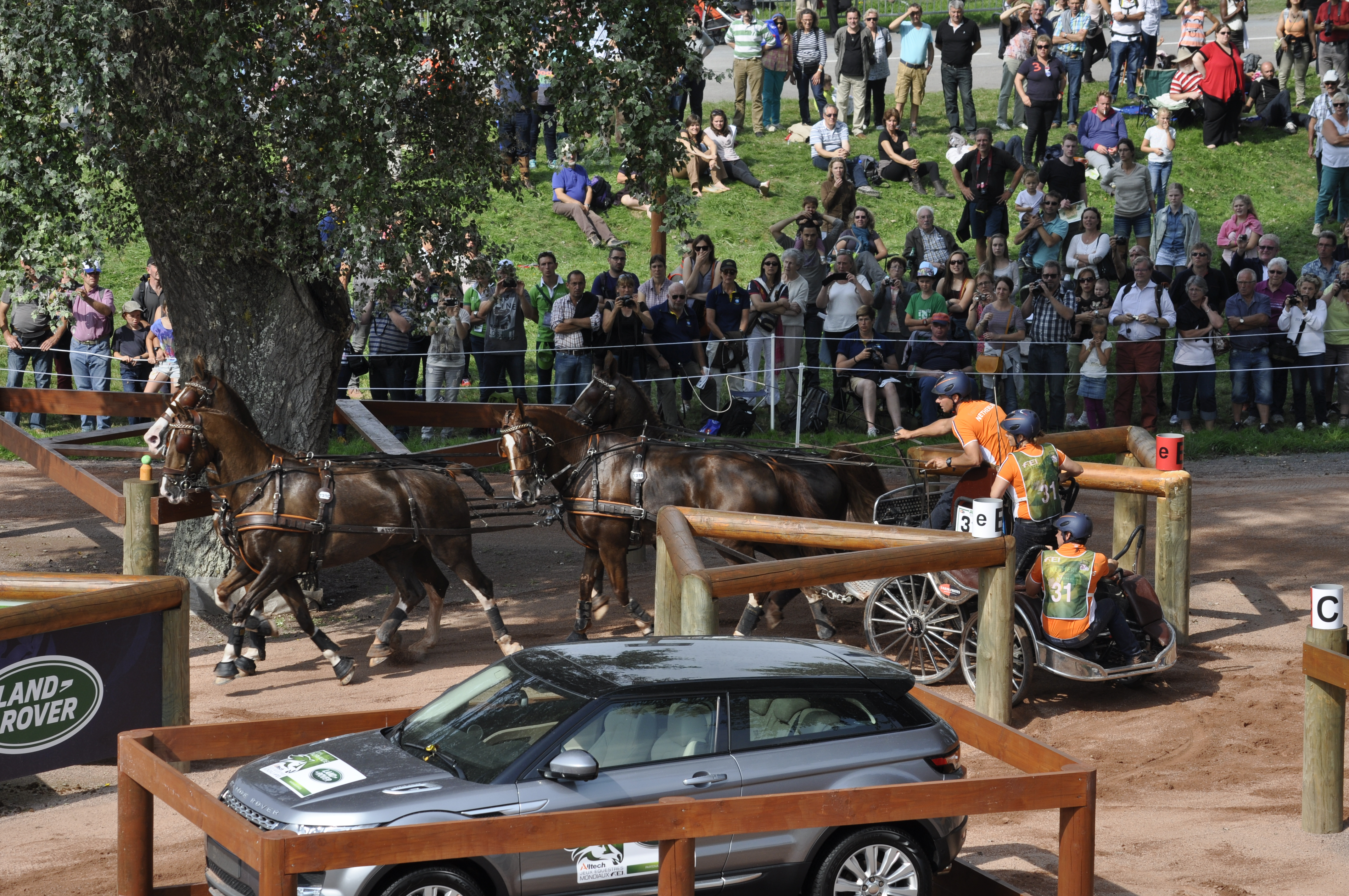 Koos de Ronde marathon JEM 2014